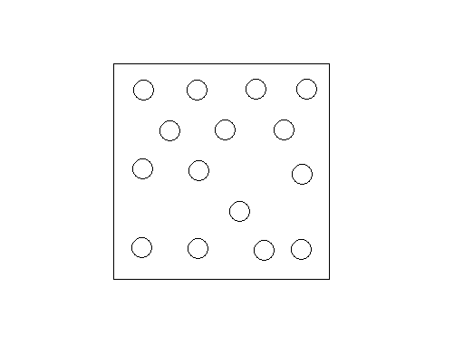 Poisson disc supersampling